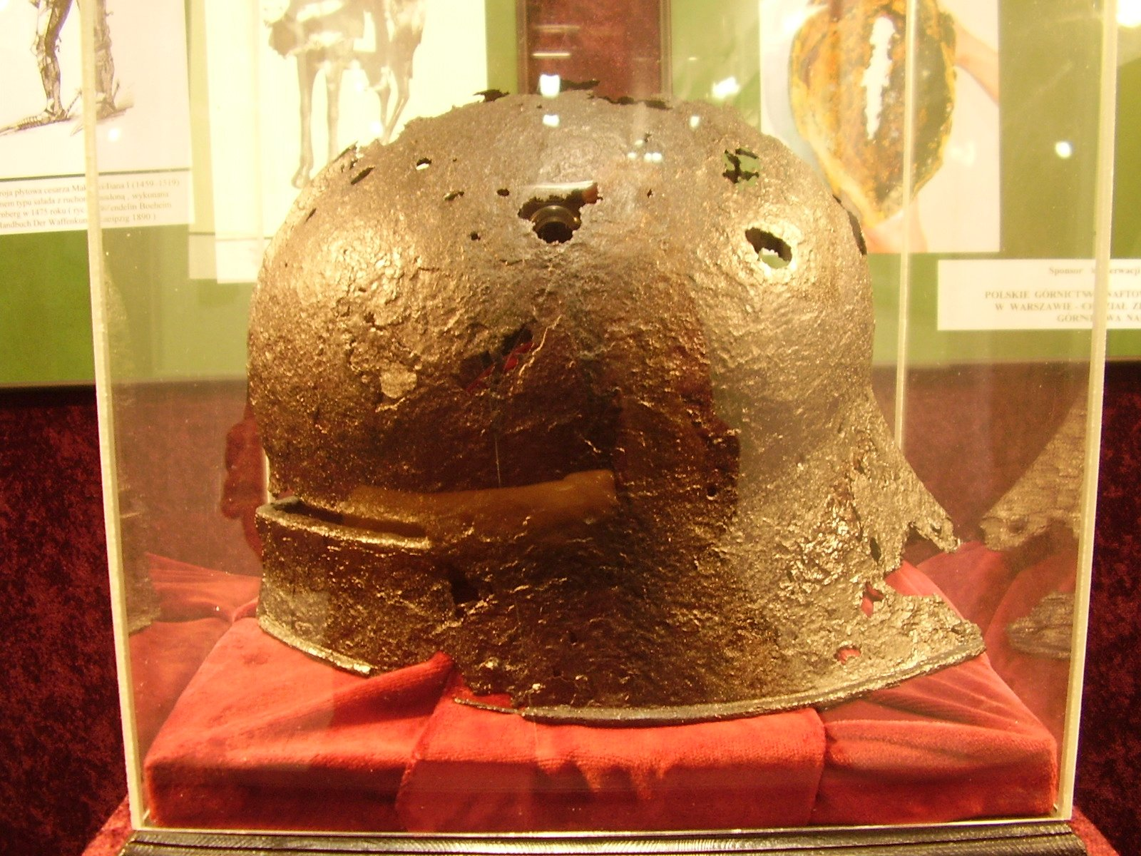 Salada